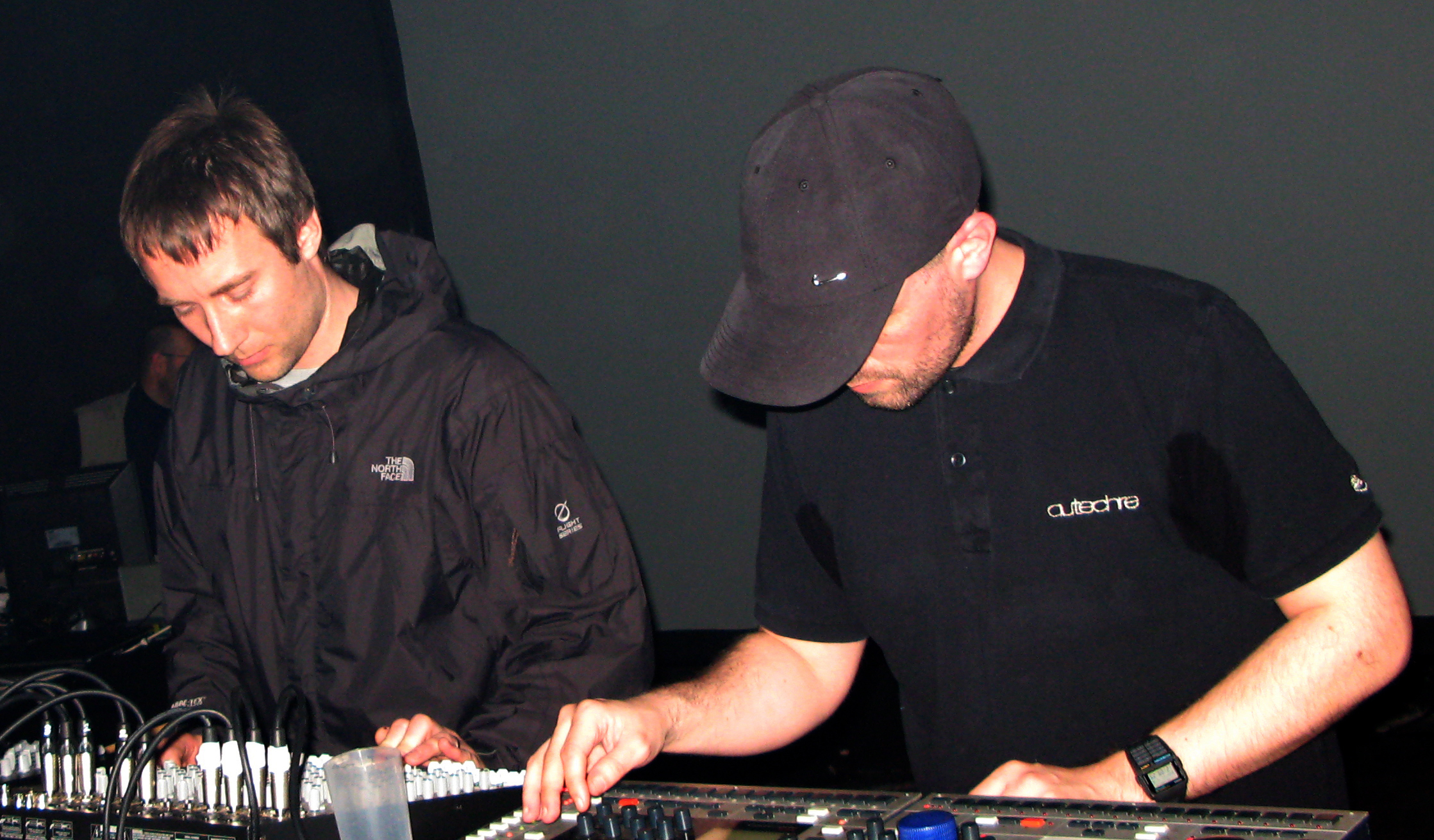 Autechre